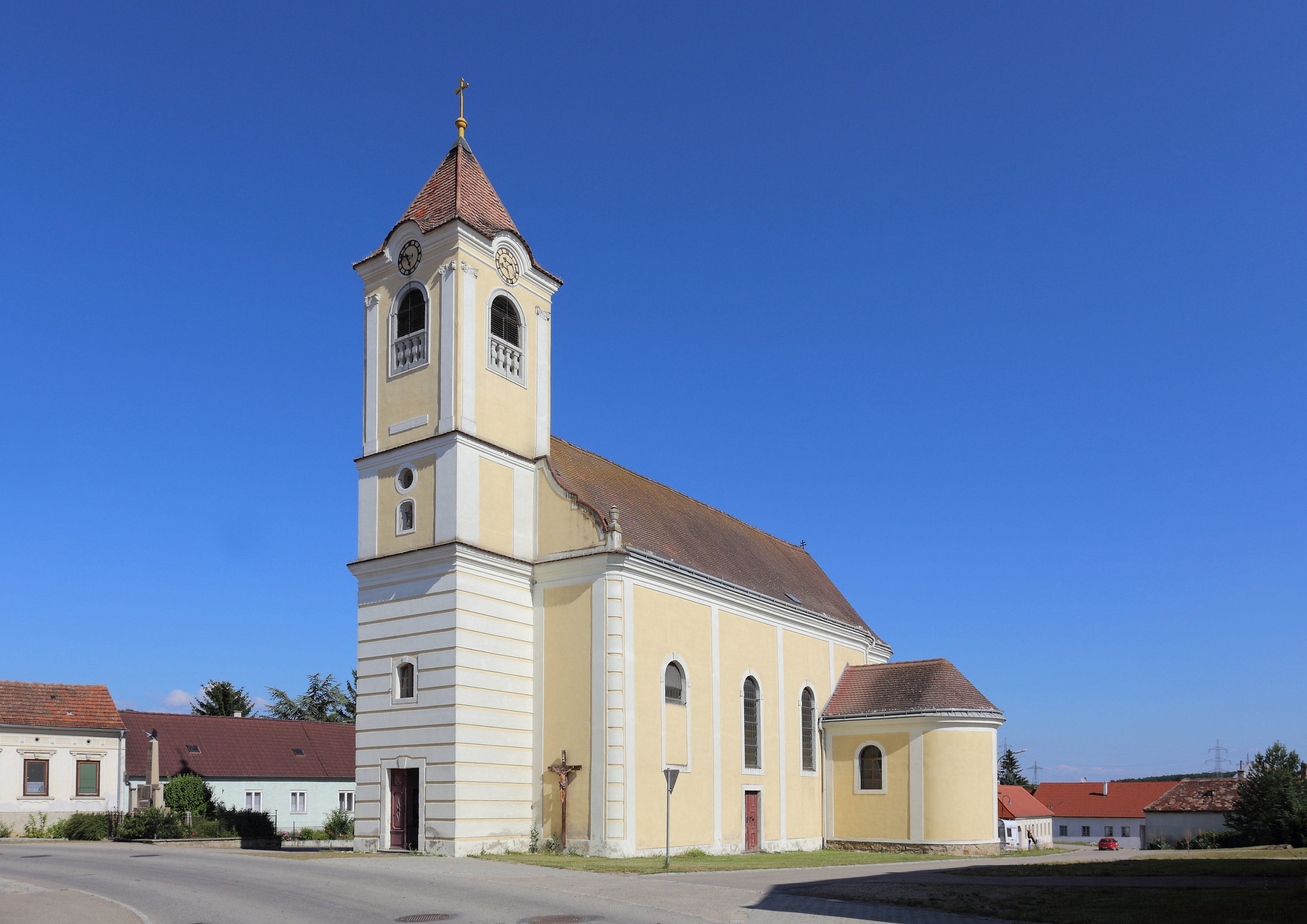 Katholische Pfarrkirche hl. Kreuz in Grafenberg, ein Ortsteil der niederösterreichischen Gemeinde Straning-Grafenberg. Dieses klassizistische Bauwerk wurde 1801 errichtet.